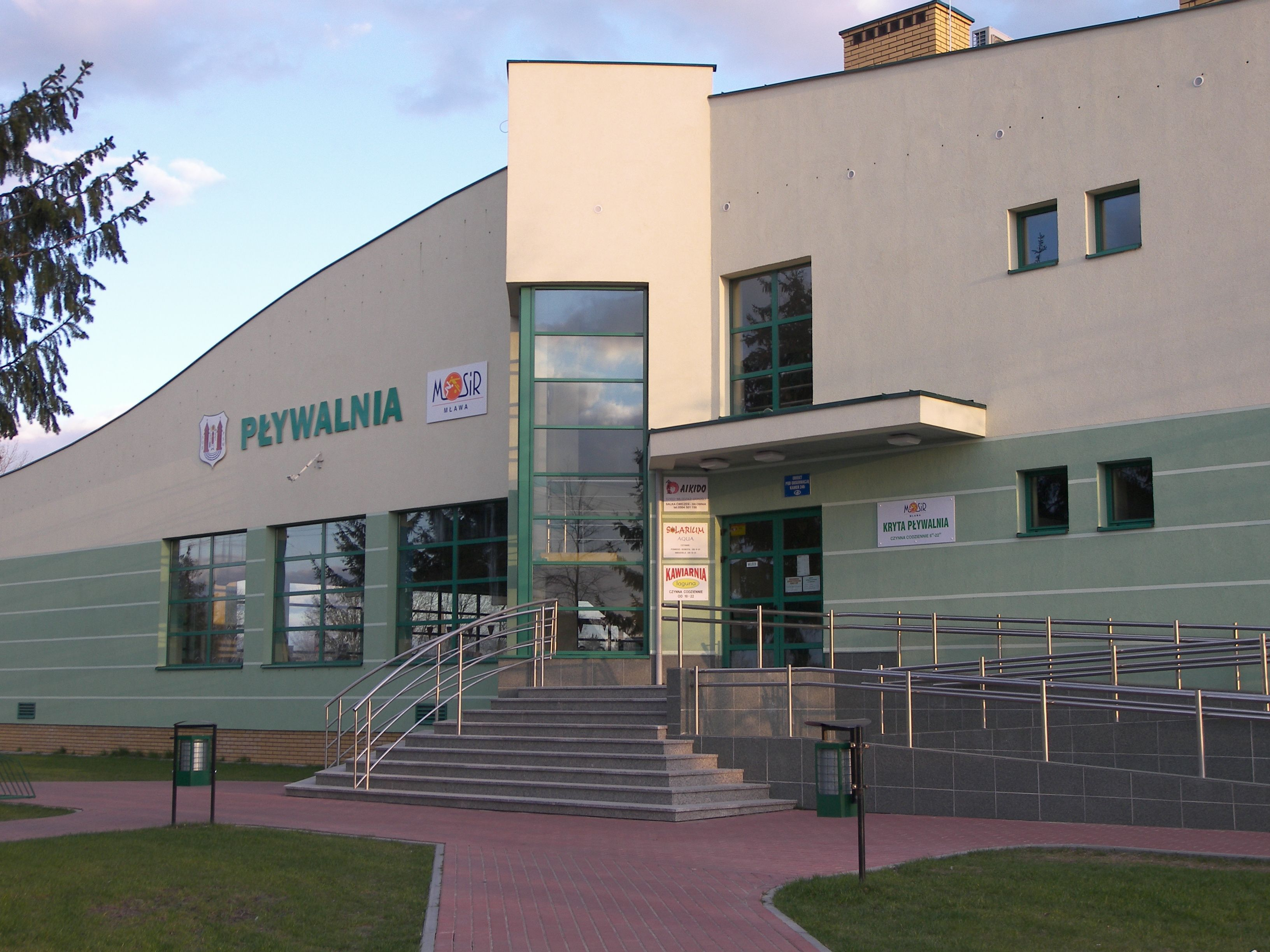 pływalnia